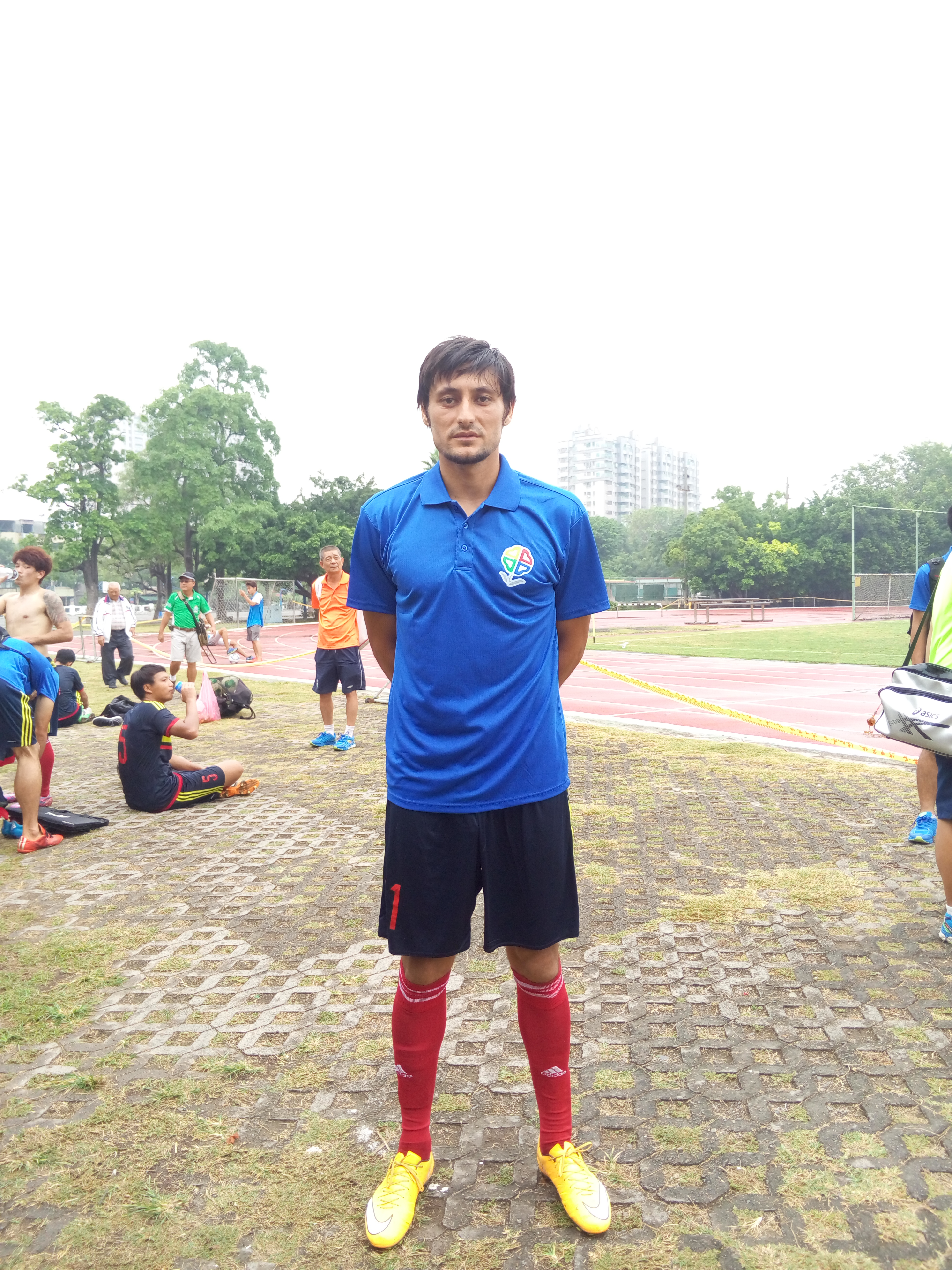 土耳其歸化臺灣足球運動員朱恩樂（土耳其語：Onur Dogan）